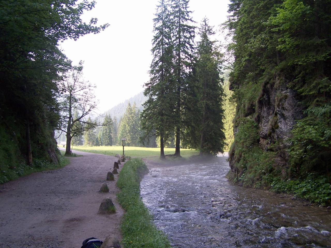 Brama Kantaka (Dolina Kościeliska)